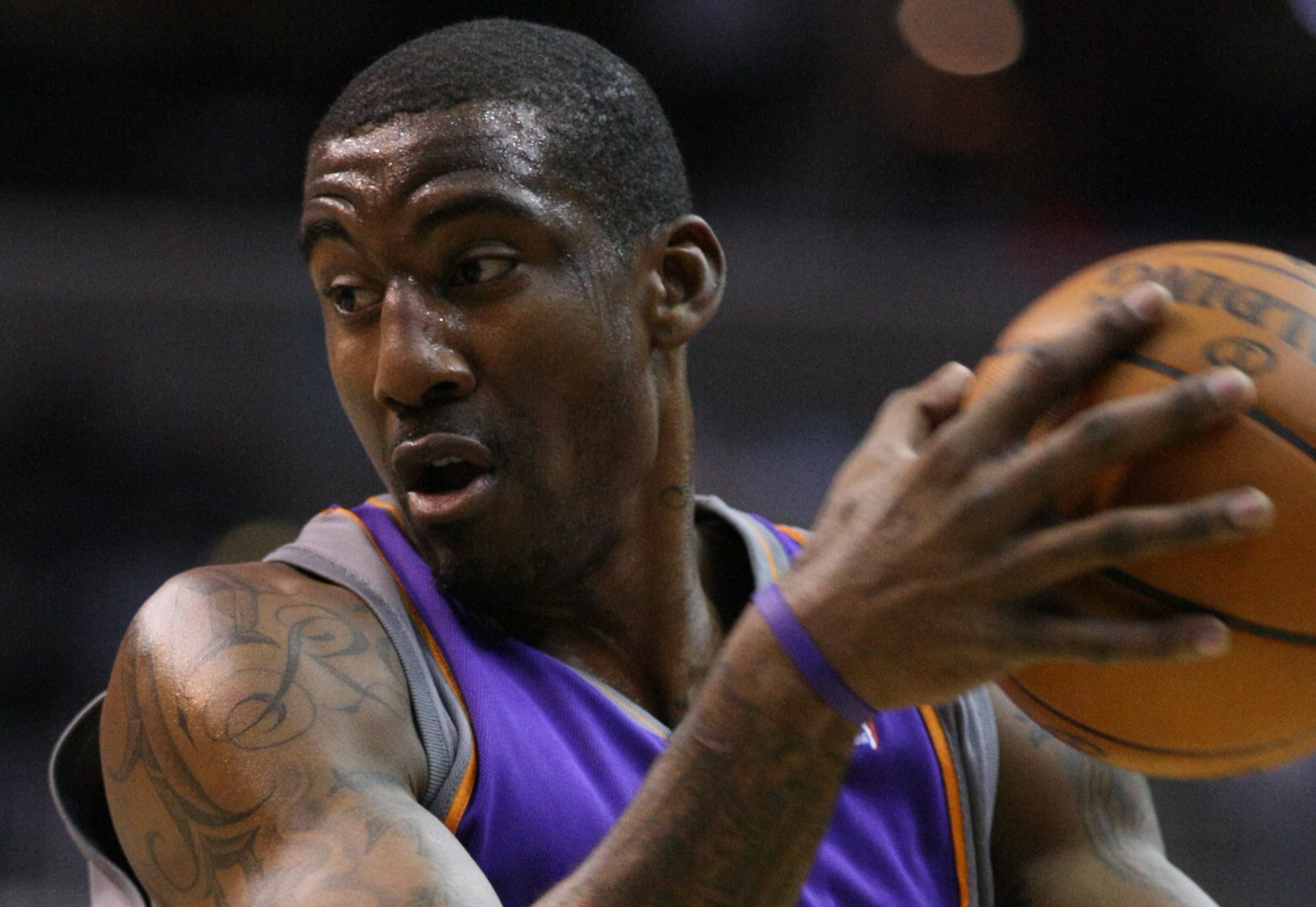 El jugador de baloncesto norteamericano Amare Stoudemire.